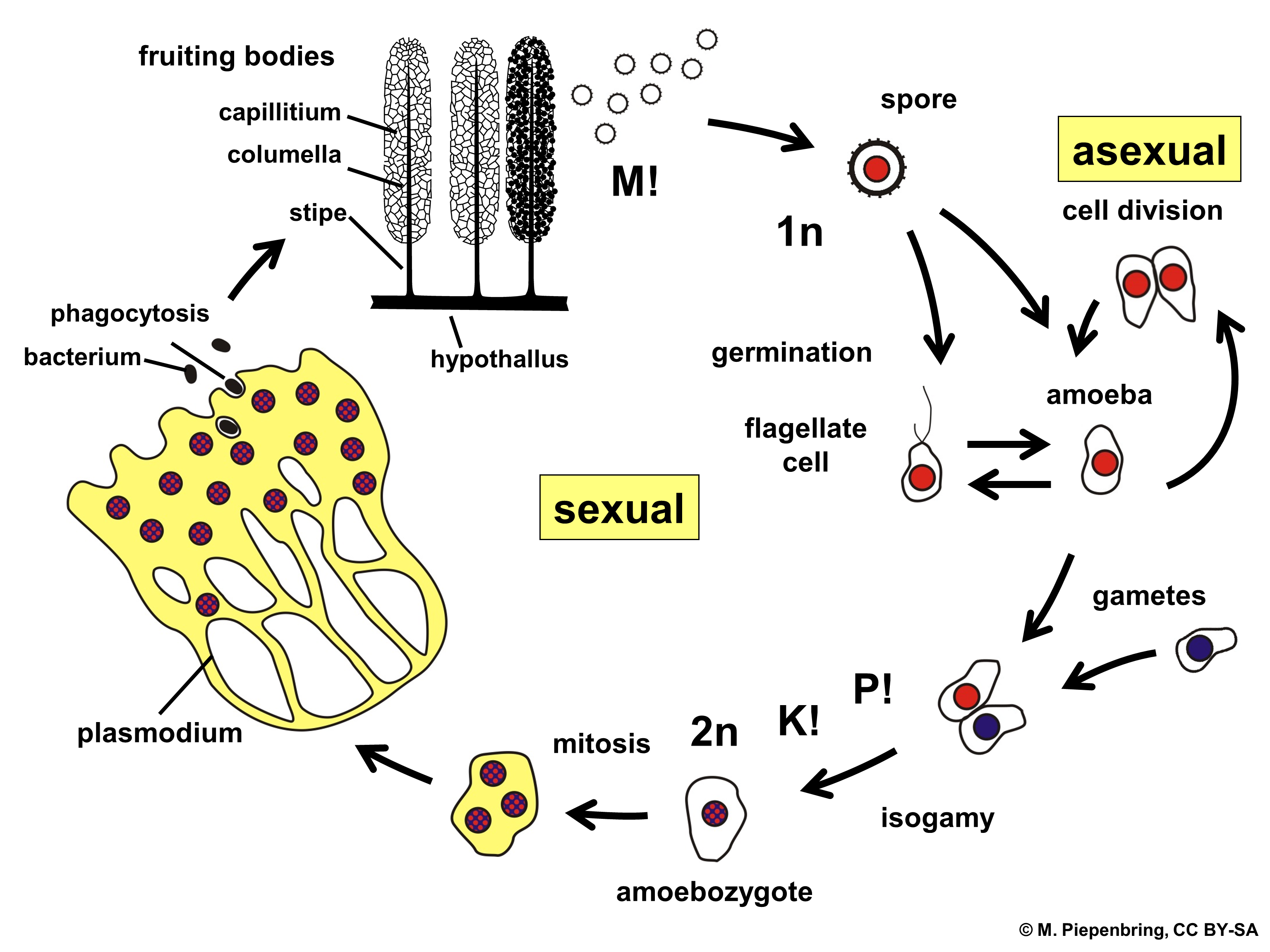 Biologische Schemata, gezeichnet und freigegeben von M. Piepenbring